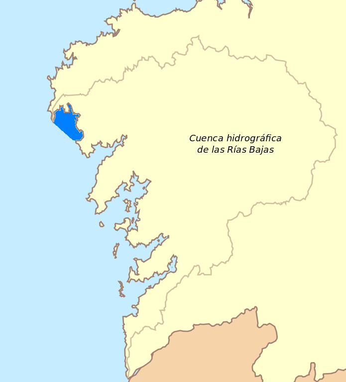 Ría de Corcubión